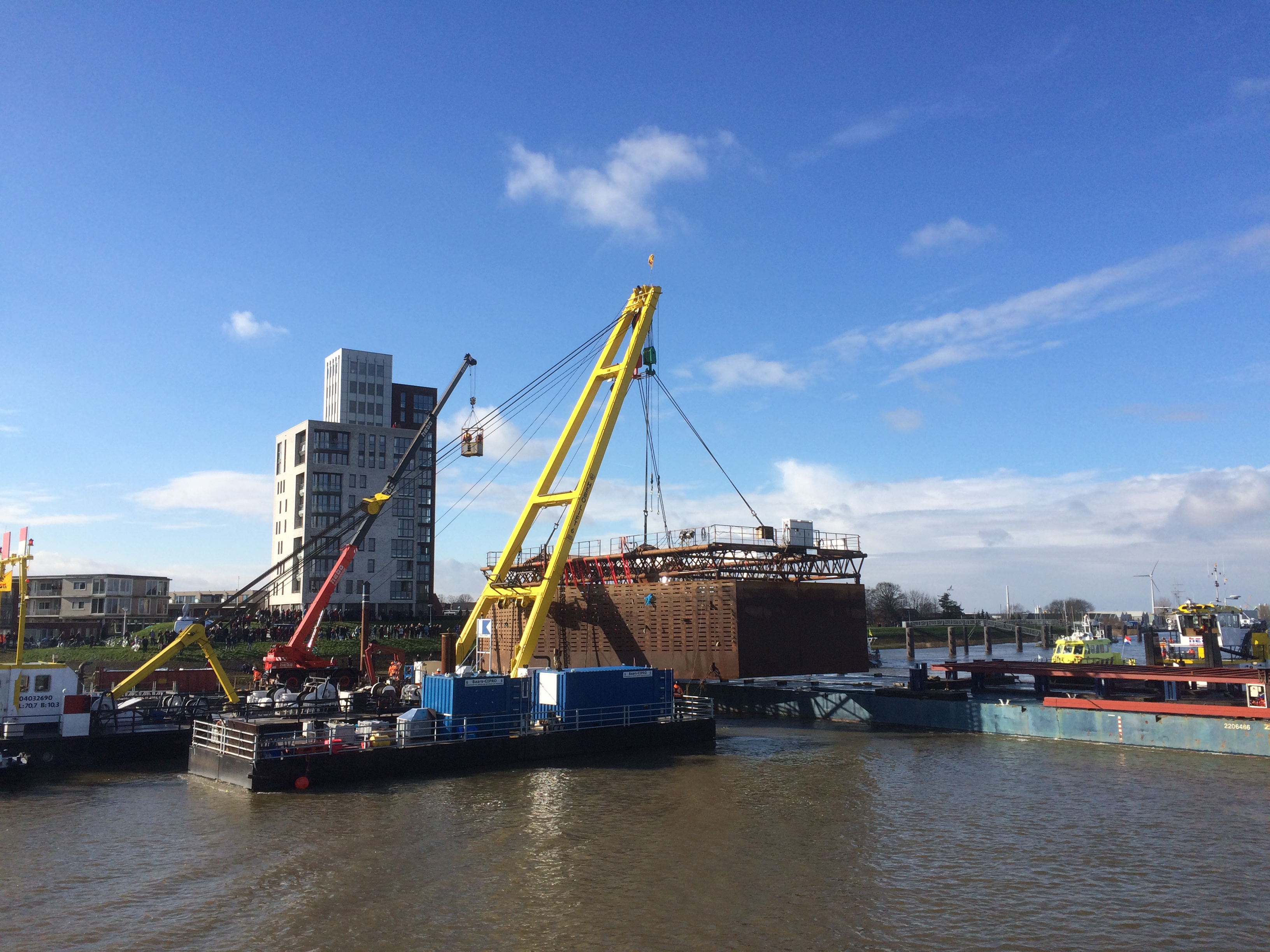 lichting IJsselkogge 10 februari 2016, Kampen, Nederland